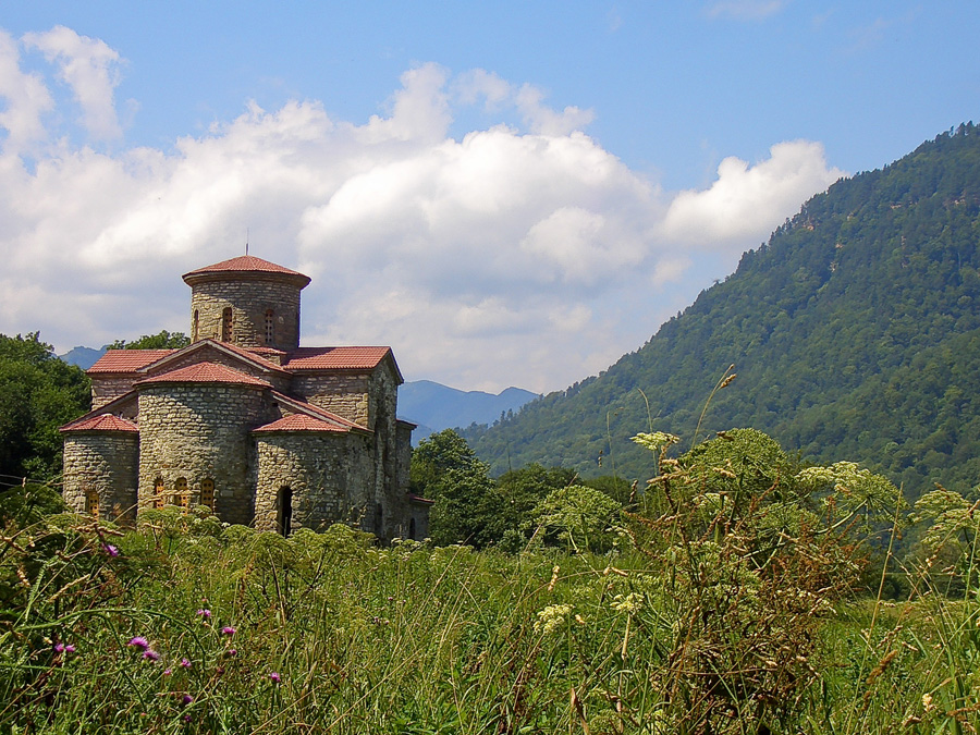 Храм Средний (Республика Карачаево-Черкессия, Теберда, посёлок Нижний Архыз)